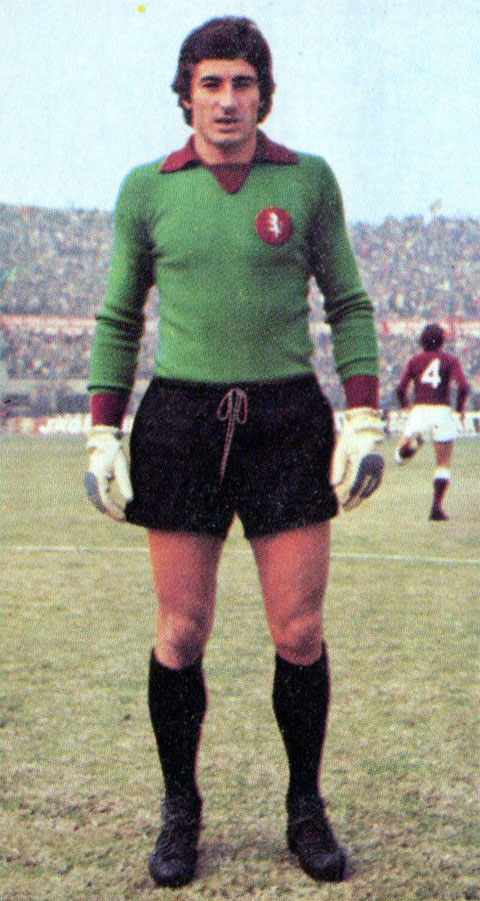 Il portiere di calcio italiano Luciano Castellini al Torino all'inizio della stagione 1974-75.